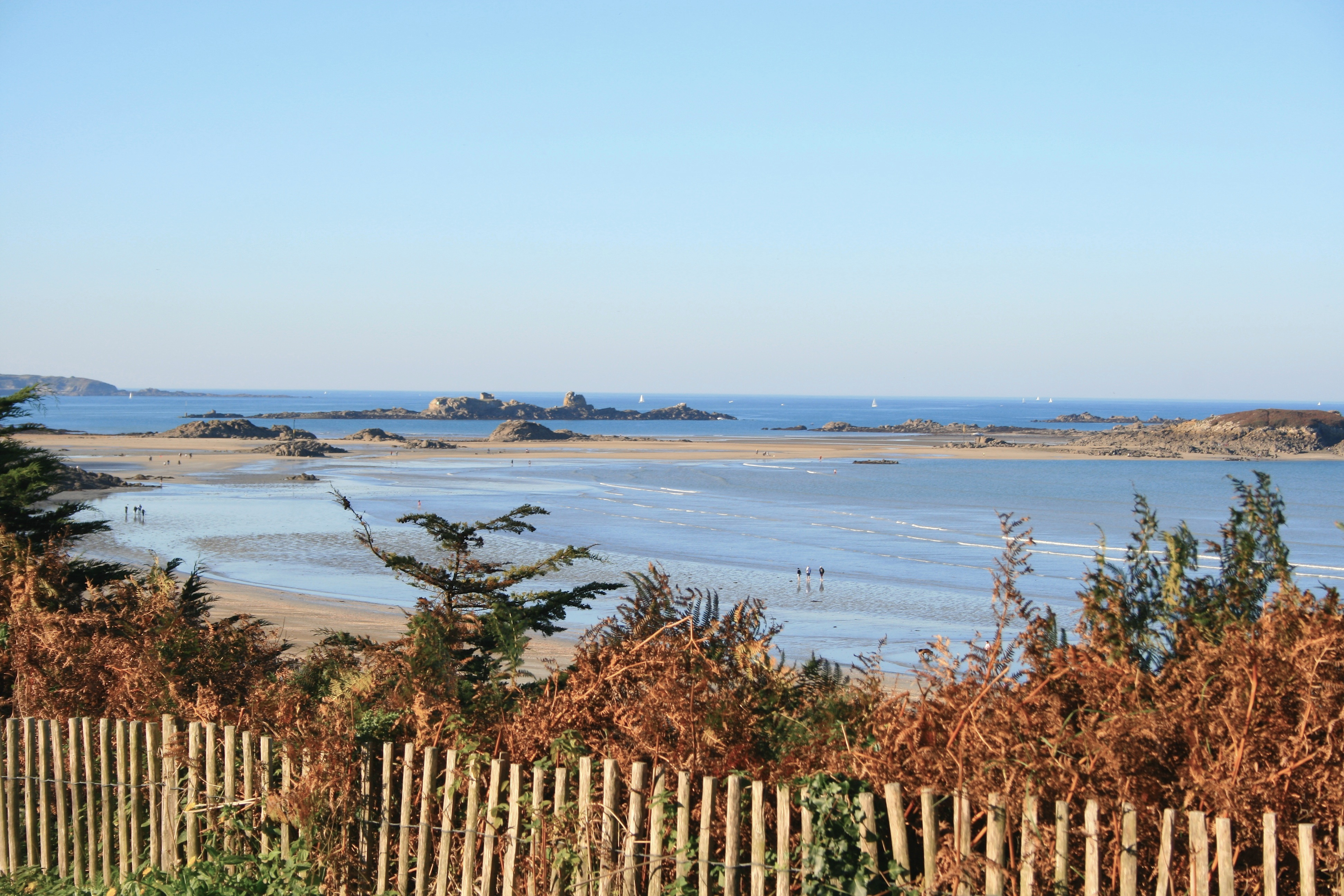 La plage du Rougeret à Saint-Jacut-de-la-Mer dans les Côtes d'Armor. Cette plage se situe entre la Pointe du Chevet, à l'ouest, et la Pointe de Sainte-Awawa, à l'est, et fait face à l'archipel des Ébihens. Ces îles sont accessibles à pied à marée basse.